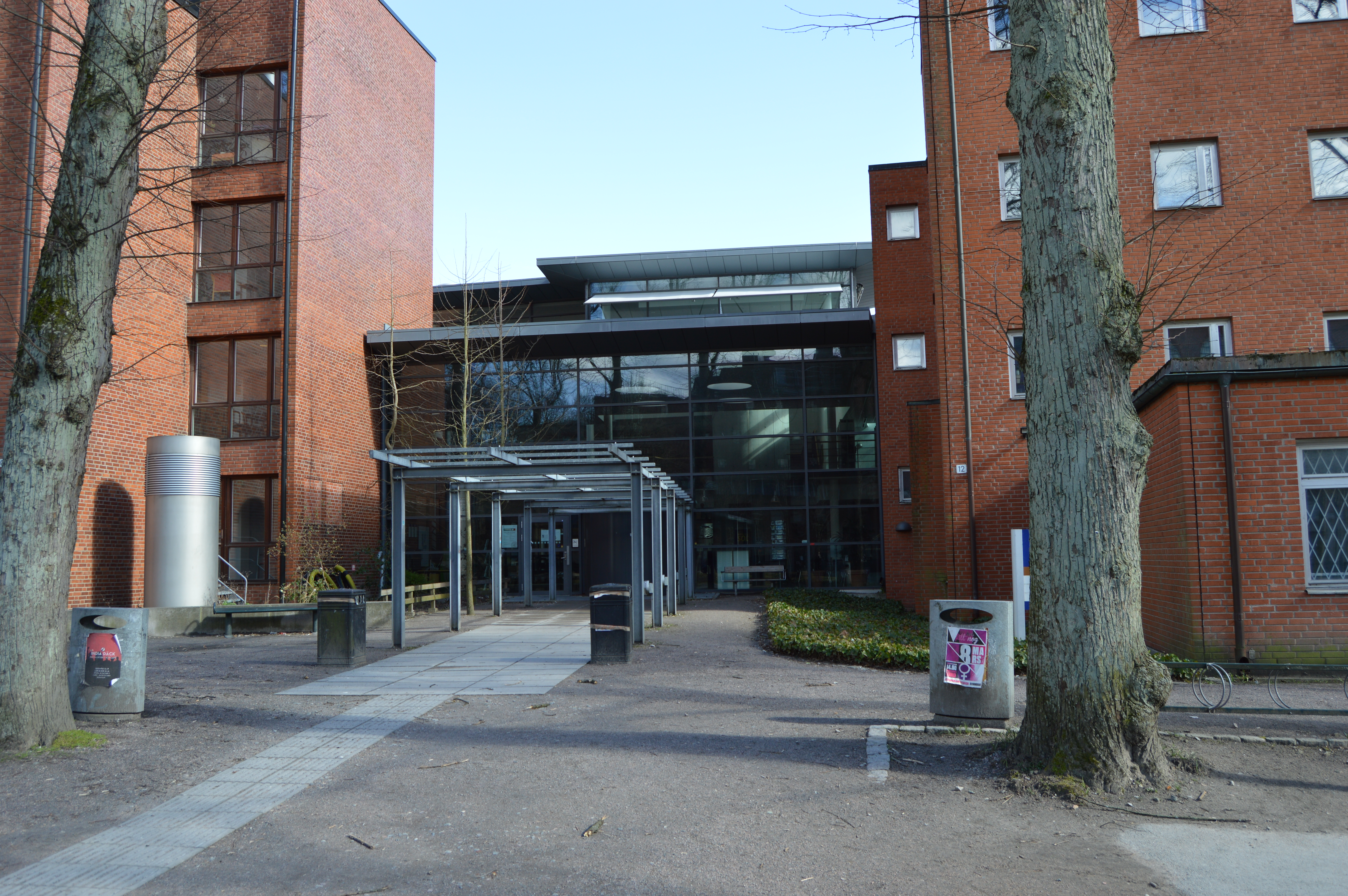 SOL-centrum entré.